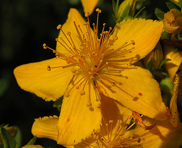 Echtes Johanniskraut (hypericum perforatum), aufgenommen am Ohleberg in Buseck